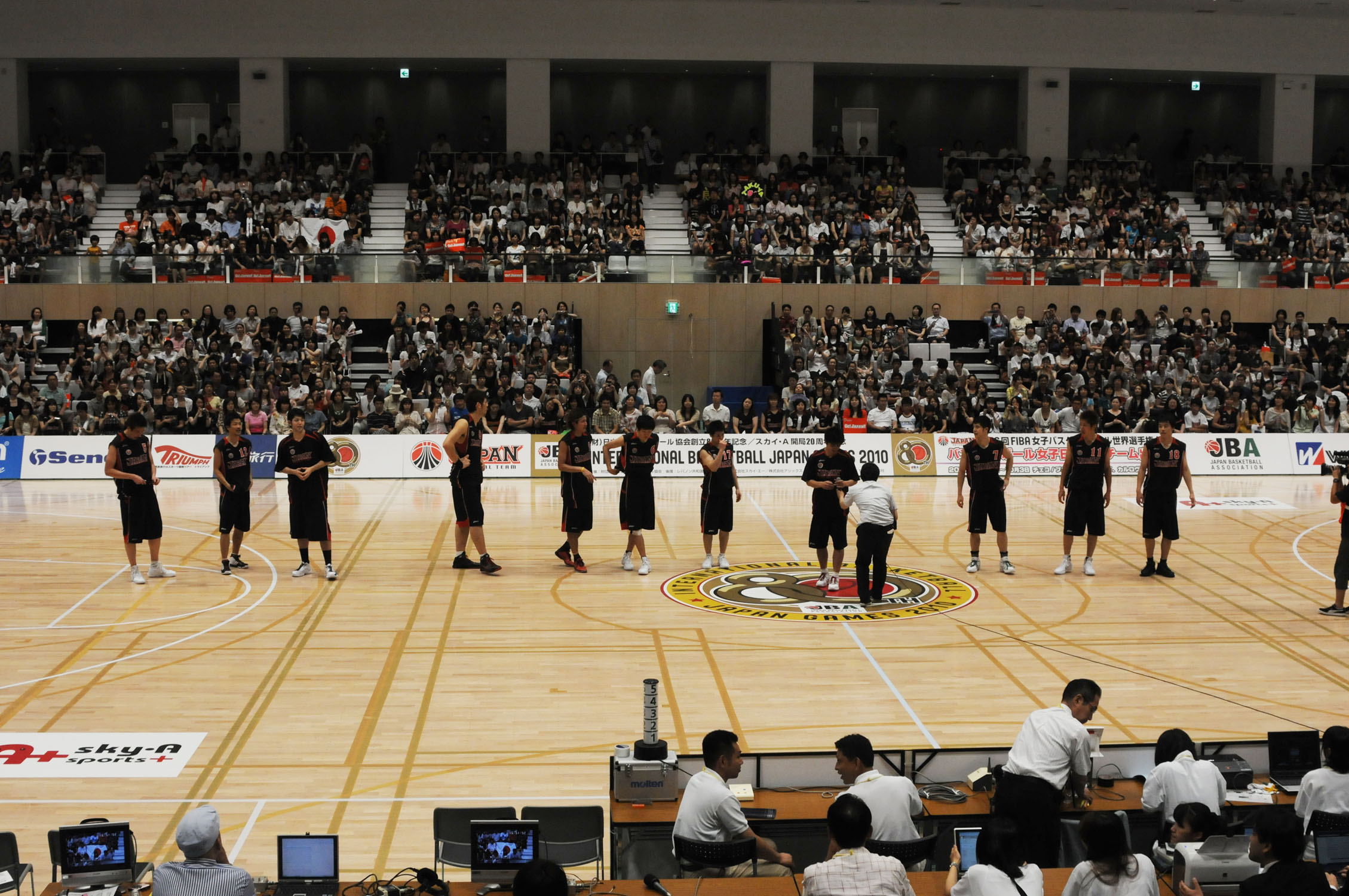 バスケットボール男子日本代表チーム。墨田区総合体育館で。